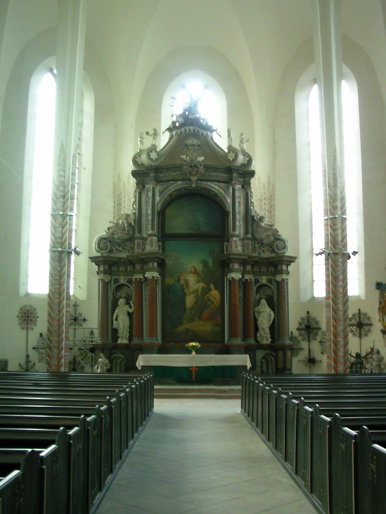 Altar der Nikolaikirche Görlitz